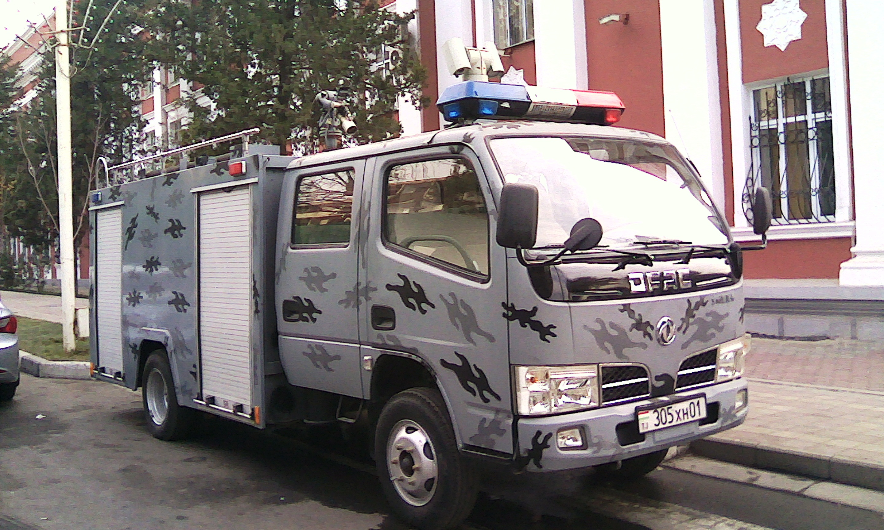 Спецмашина, полицейский транспорт. Таджикистан